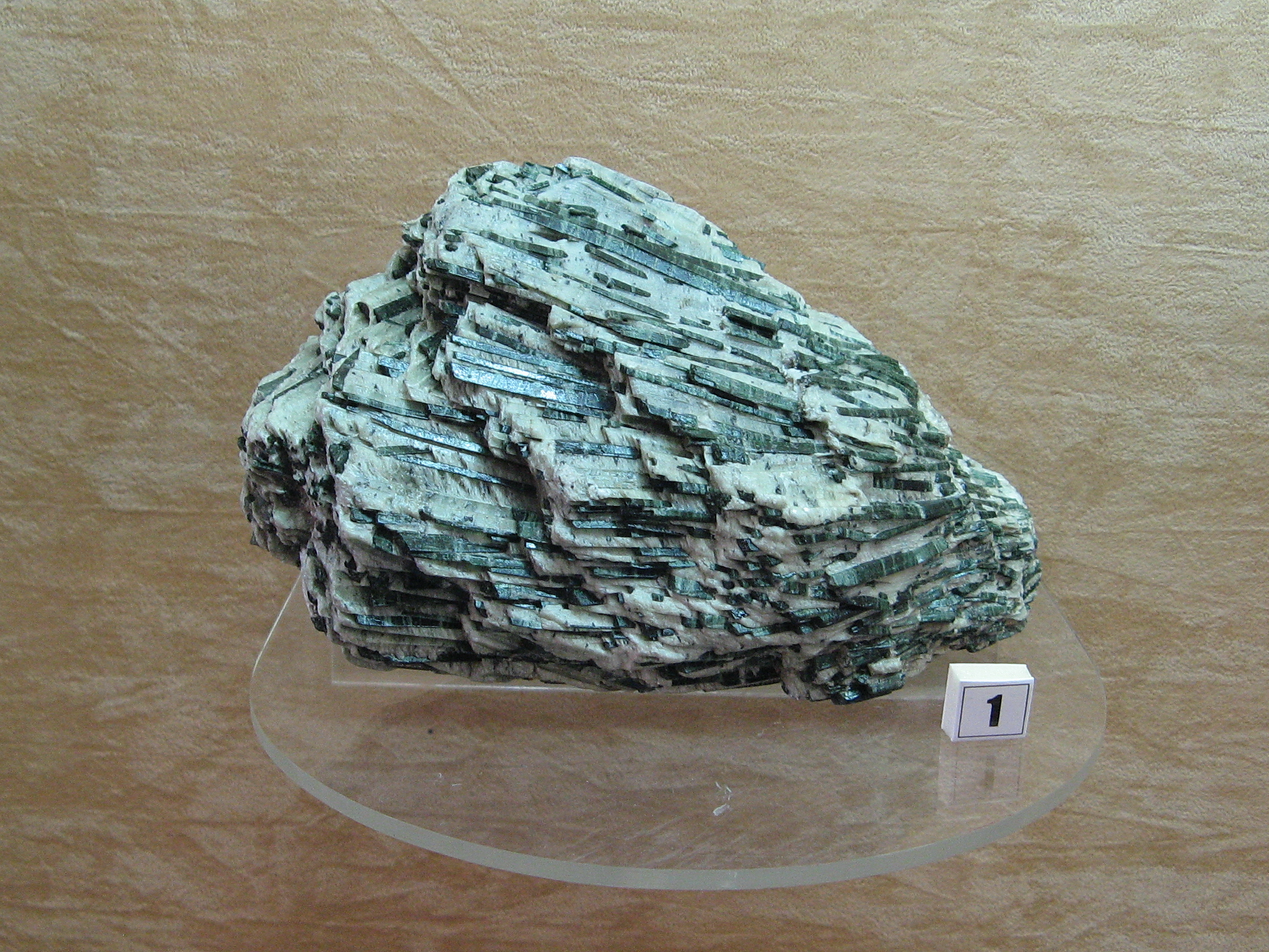 Actinolite, da Austrália